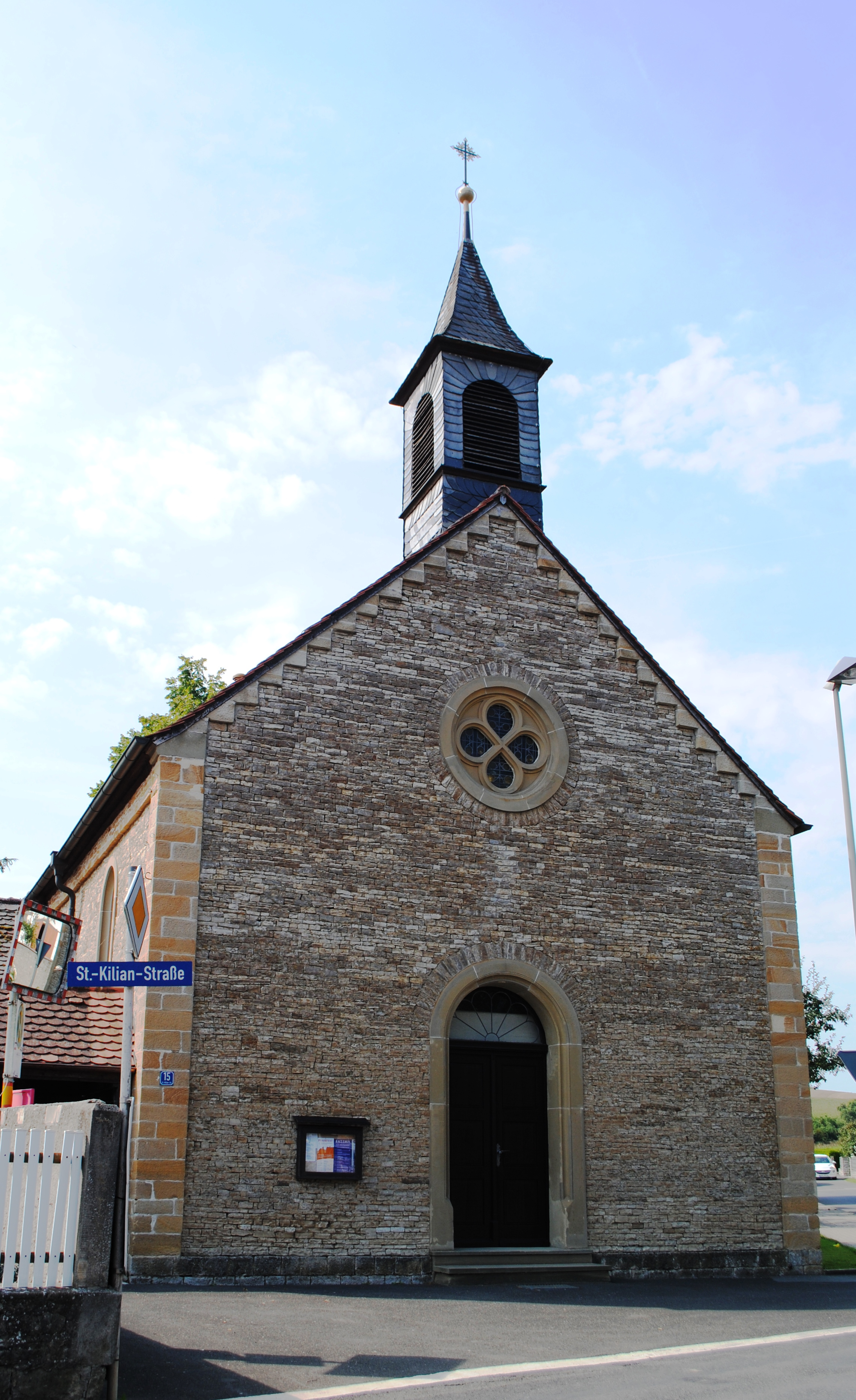 Kirche, SchnepfenbachThis is a photograph of an architectural monument.